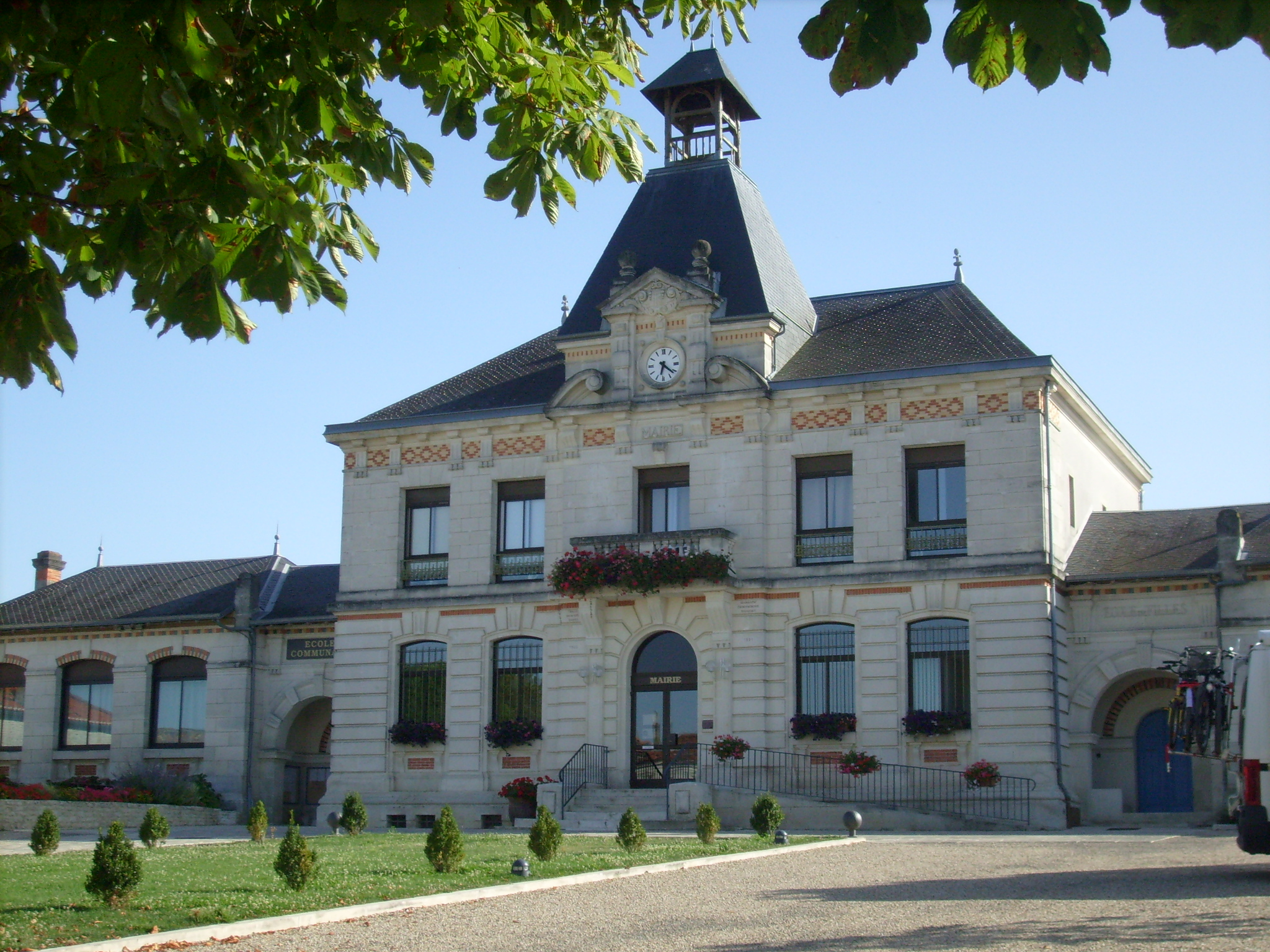 Hôtel de ville de Chérac